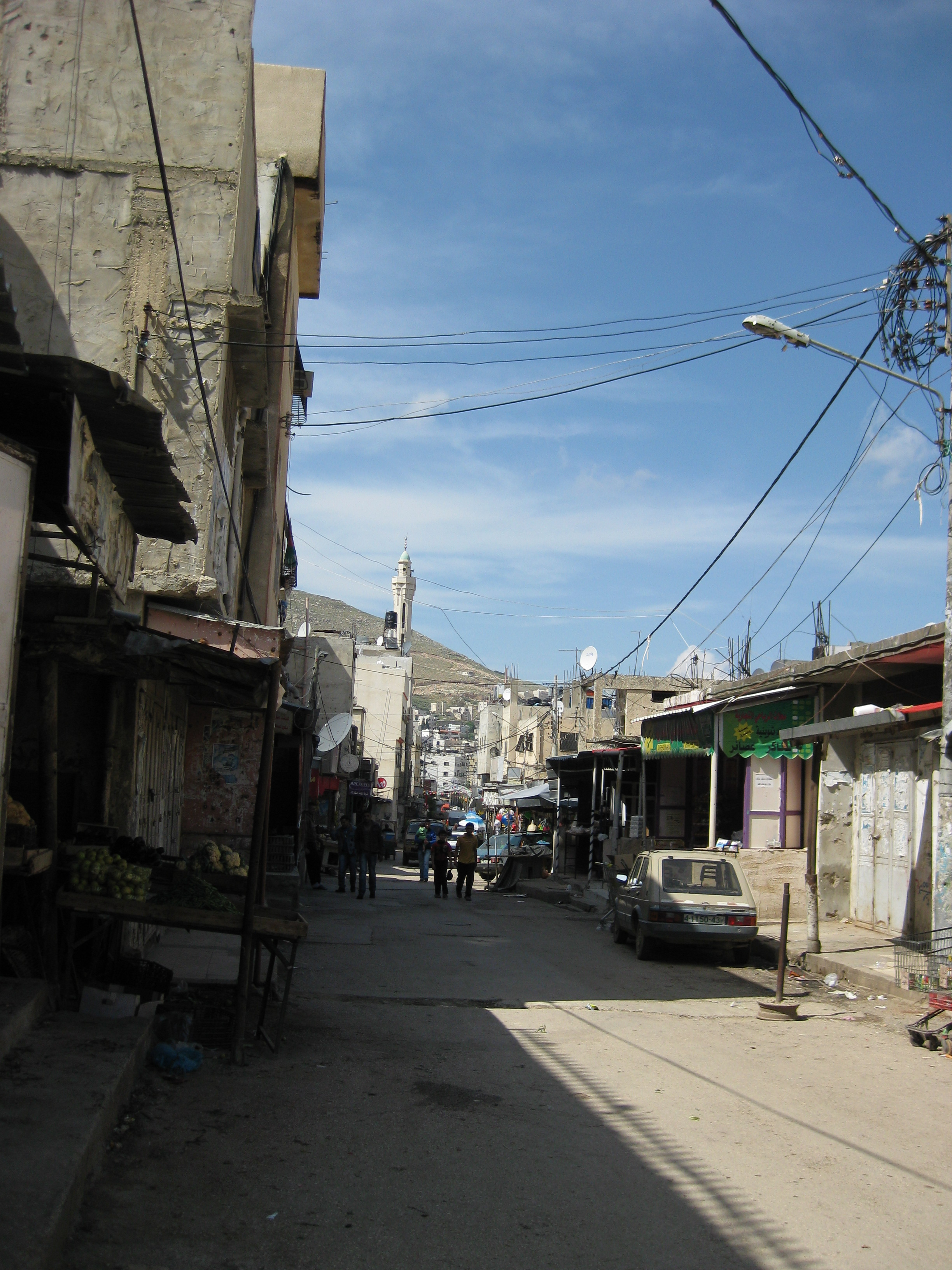 Balata camp